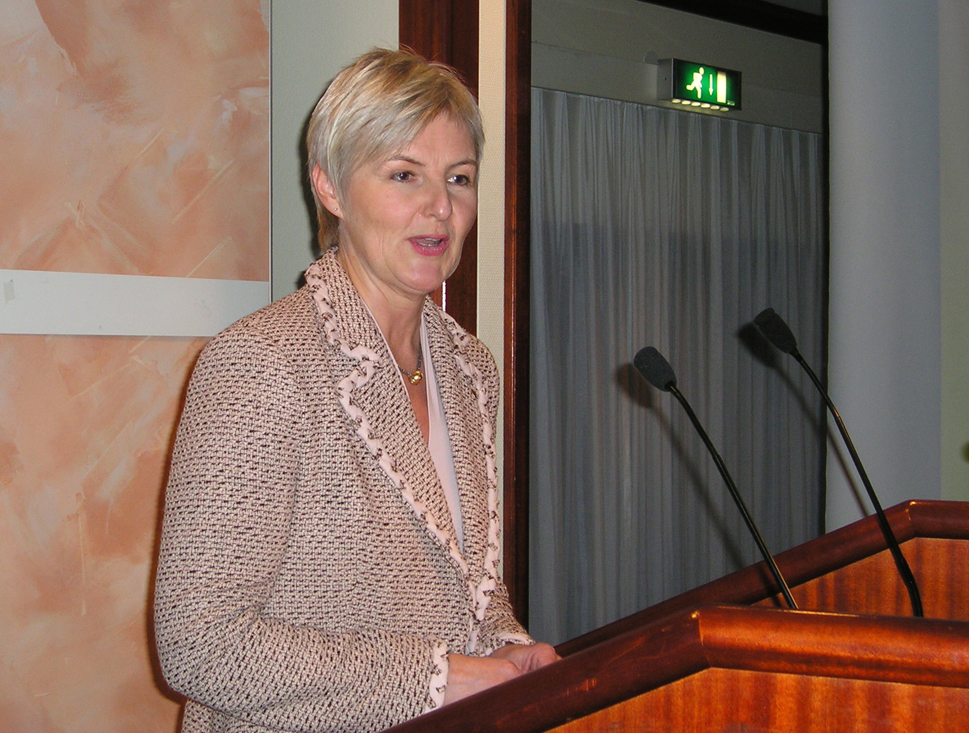 Valgerd Svarstad Haugland under Kirkemøtet 2004.